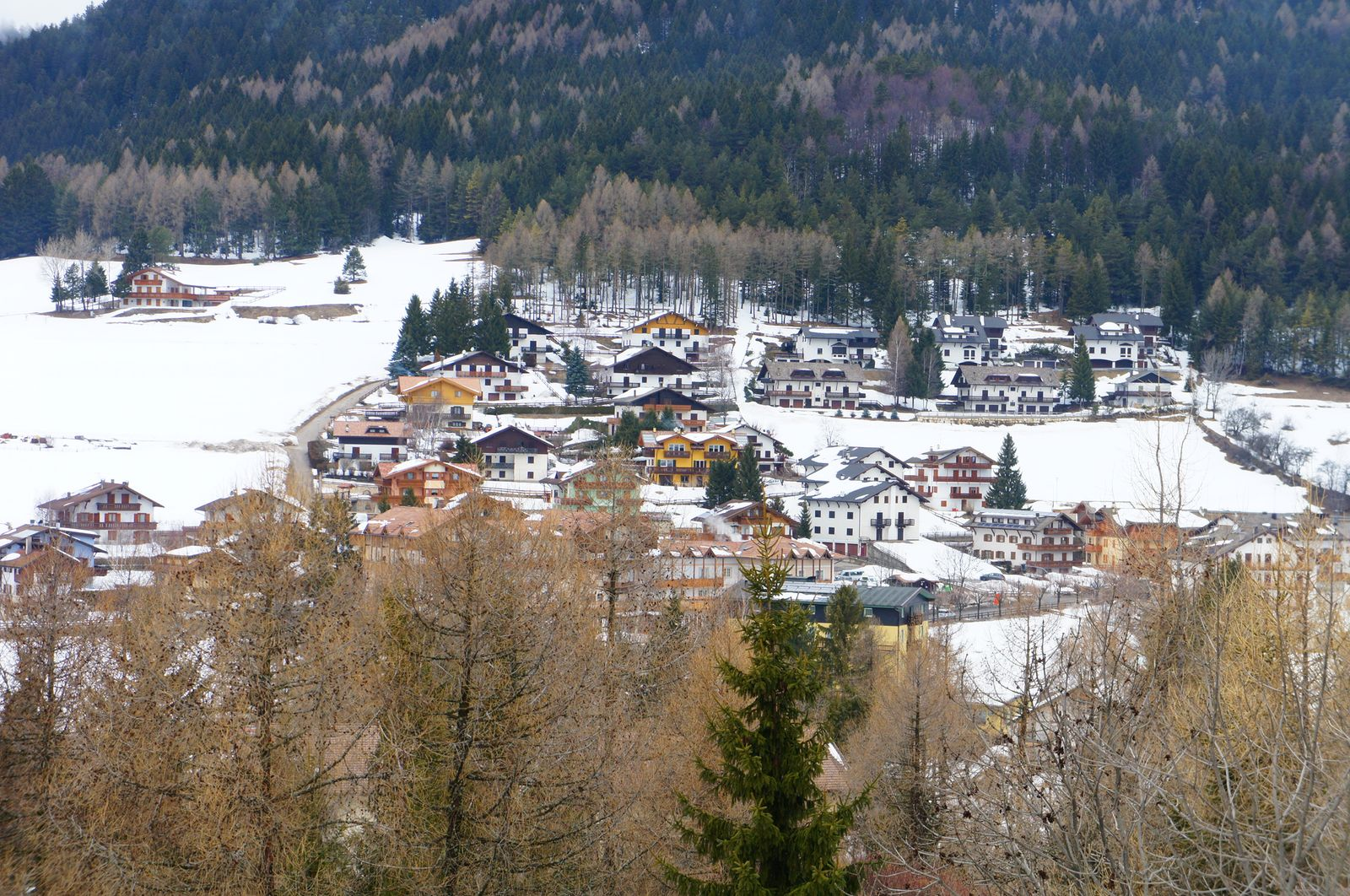 38064 Colpi TN, Italy